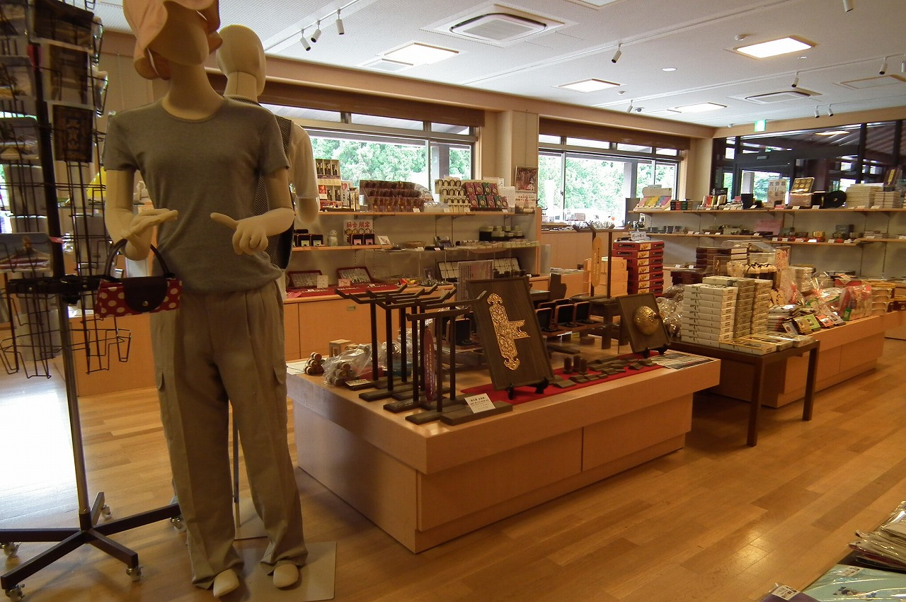 Nenbutsu-shu Sanpo-zan Muryouju-ji 念佛宗 三寶山 無量壽寺 総本山「佛教之王堂」兵庫県加東市上三草1136番地